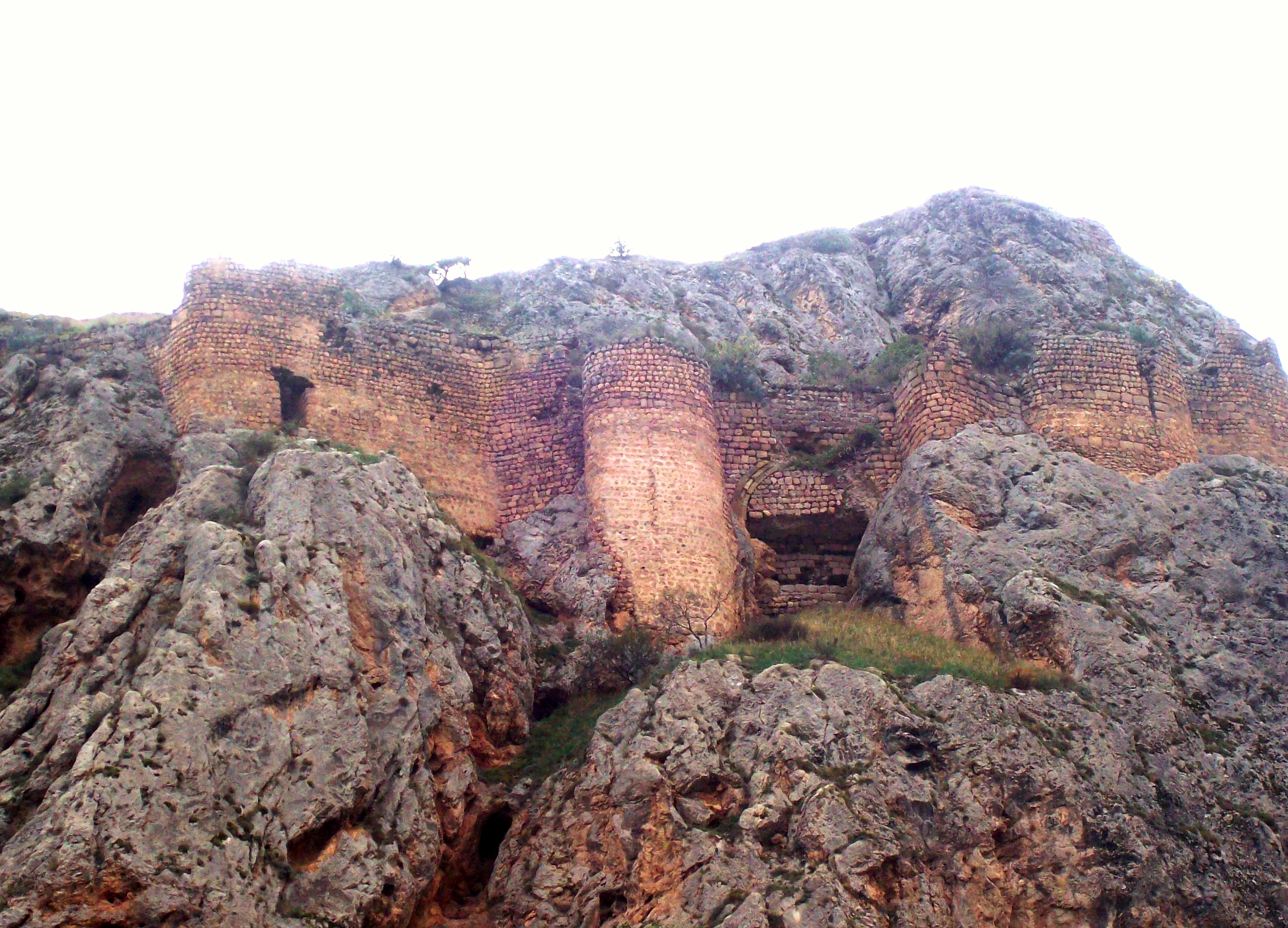 ახიზა